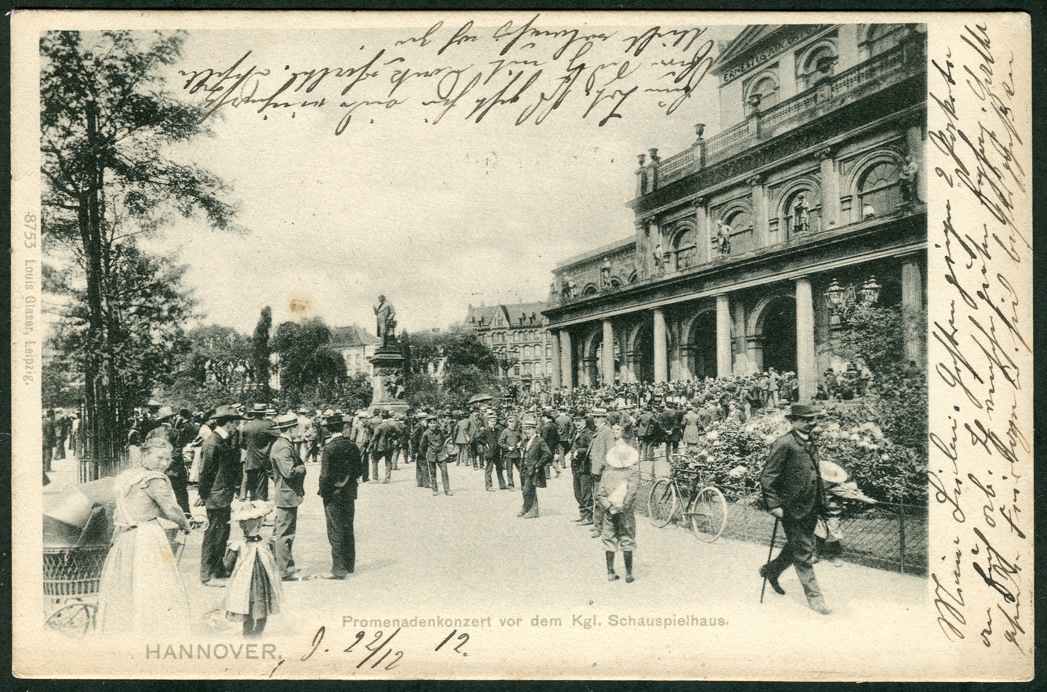 Im Lichtdruck als Ansichtskarte mit der fortlaufenden Nummer 8753 vervielfältigte Fotografie aus dem Verlag von Louis Glaser mit einer Aufnahme des mit zahlreichen Personen belebten Opernplatzes vor dem Haupteingang des Königlichen Schauspielhauses, Opernhaus in Hannover anlässlich eines sicher an einem Sonntag abgehaltenen Promenadenkonzertes. Das beschürtze Kindermädchen im Vordergrund links trägt als einzige Person auf dem Bild keine Kopfbedeckung ...